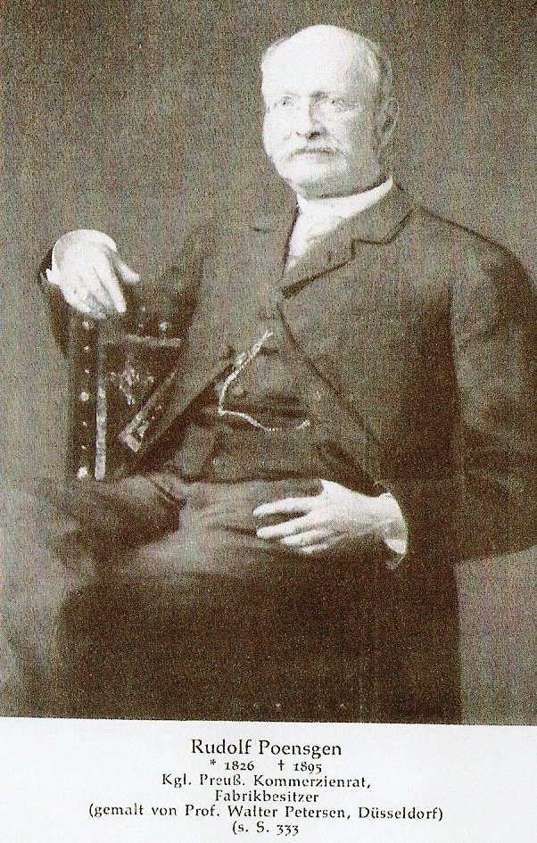 Scan eines Portraitgemäldes